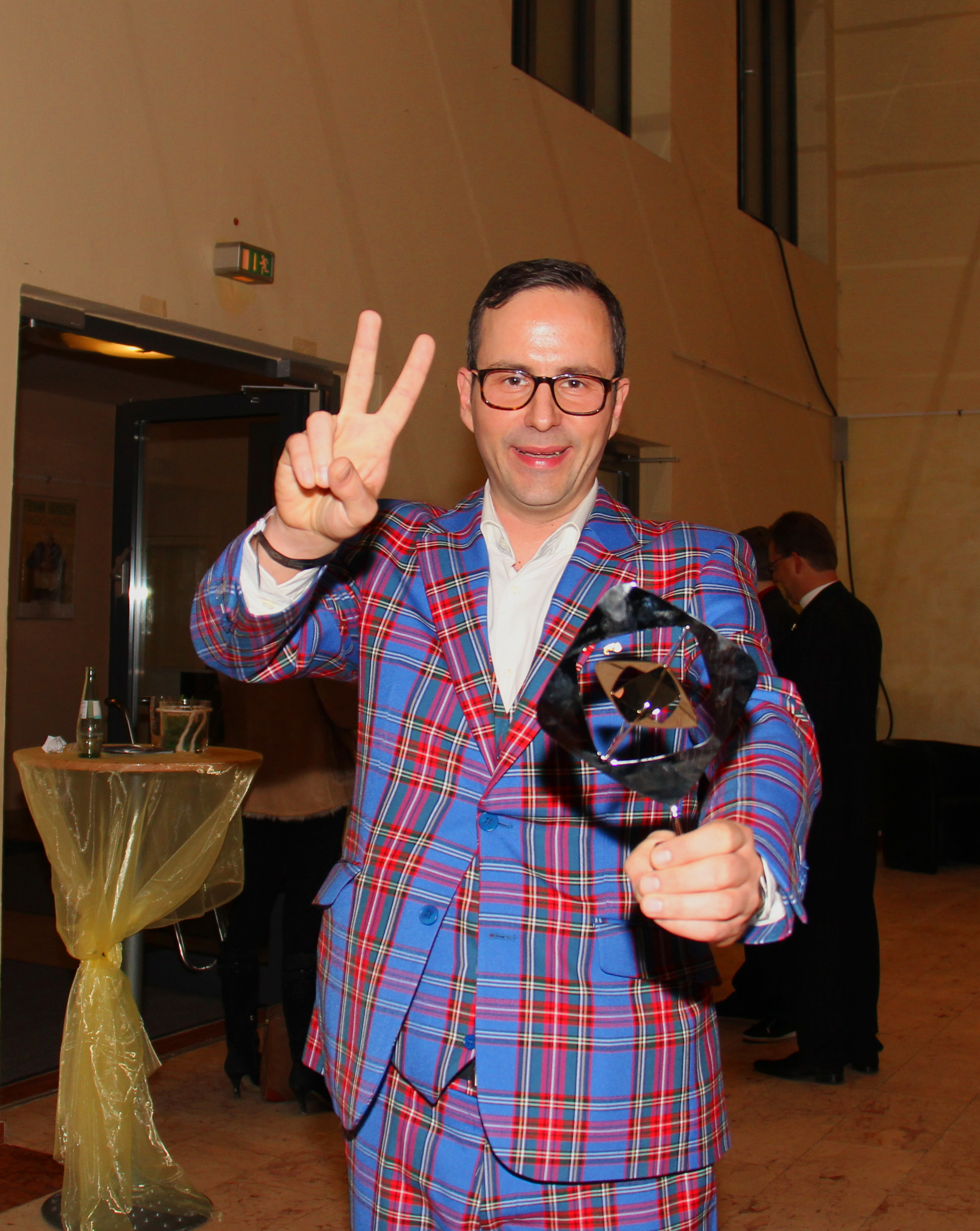 Grimme-Preisträger Kurt Krömer bei der Verleihung 2011